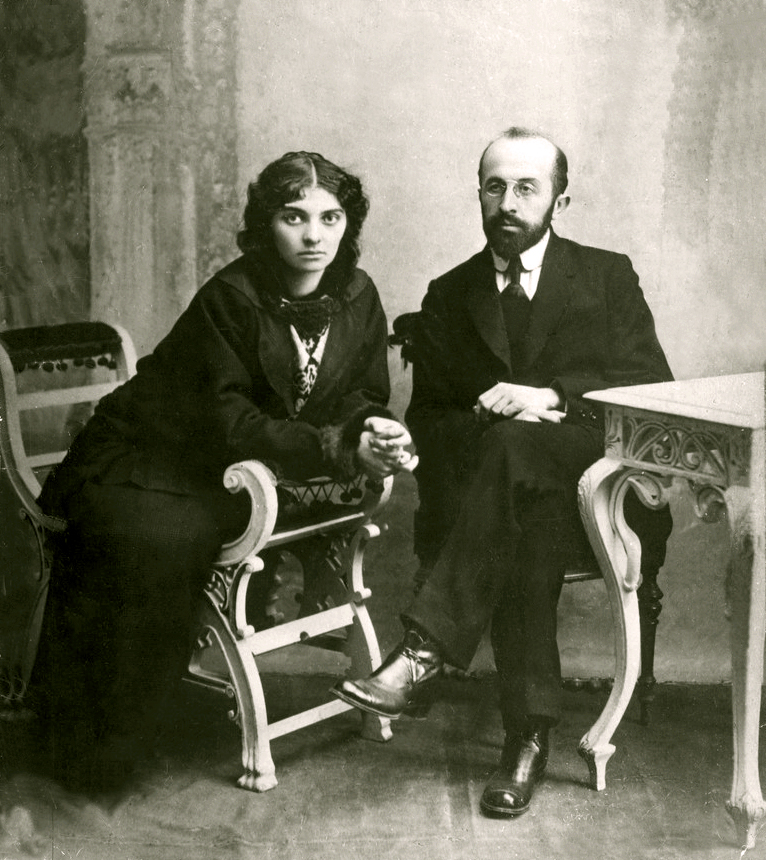 ნიკო ლორთქიფანიძე მეუღლესთან, თამარ ჩხეიძესთან ერთად